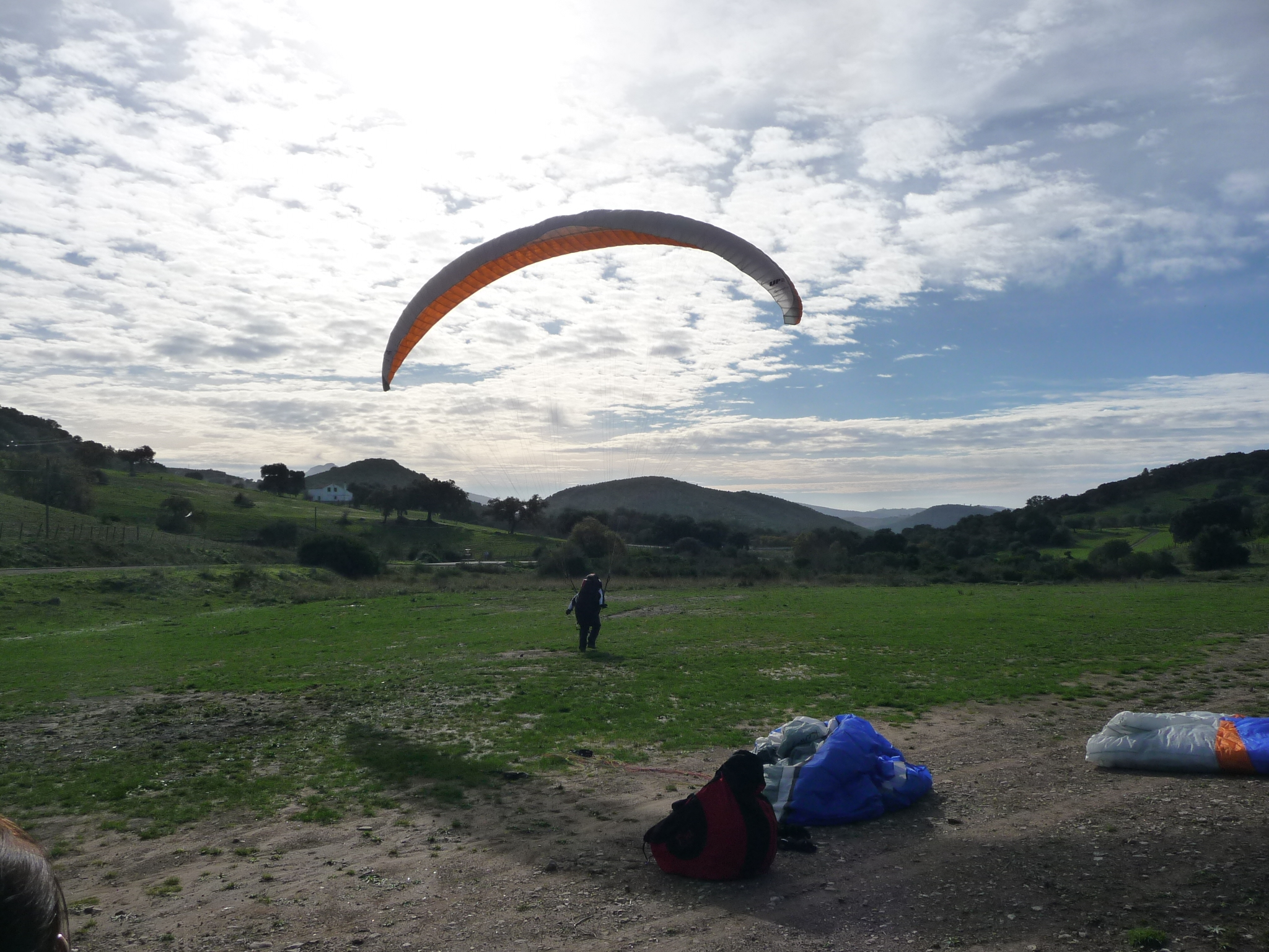 Algodonales-P1050923.JPG